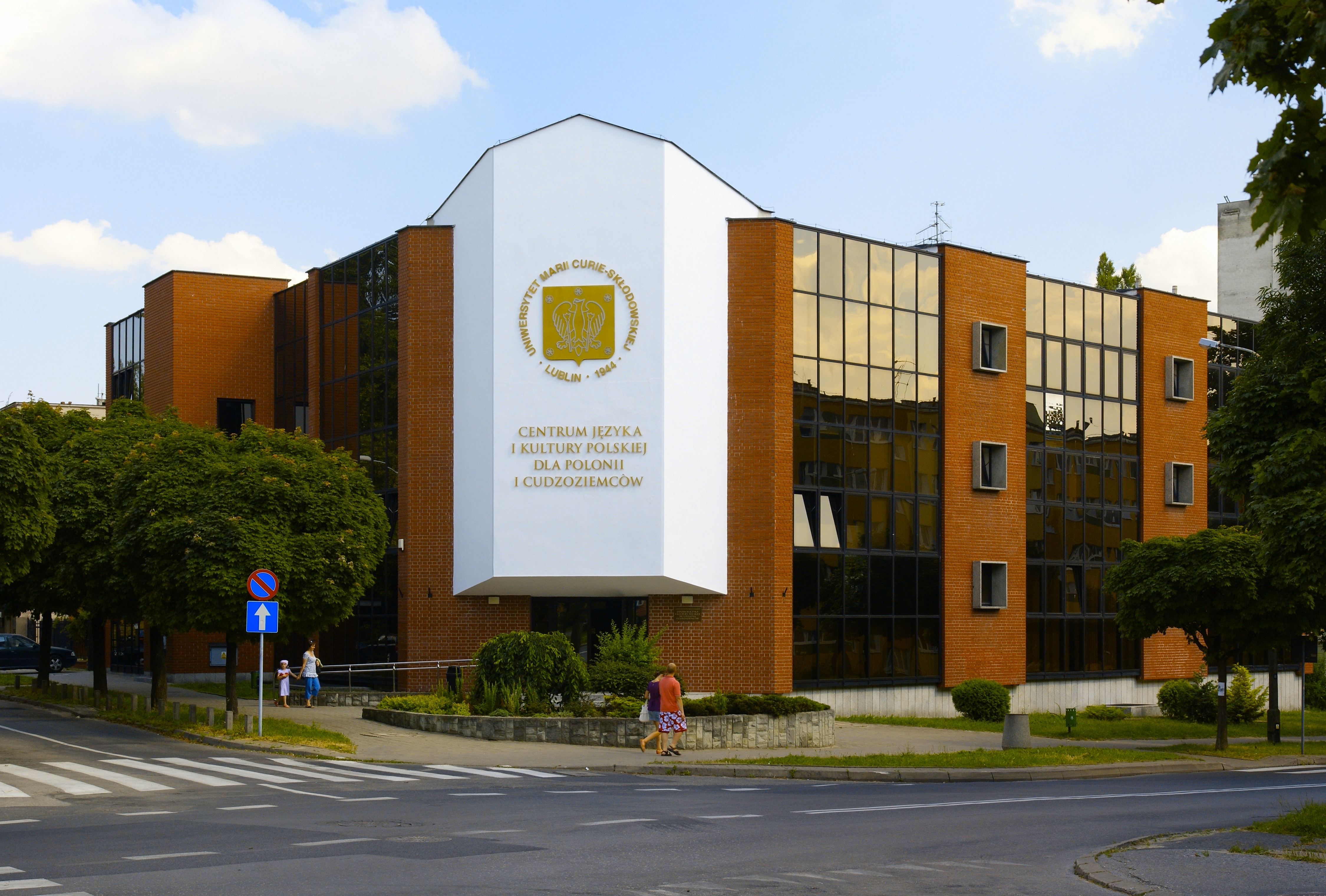 Budynek Centrum Językowego UMCS dla Polonii, Lublin.